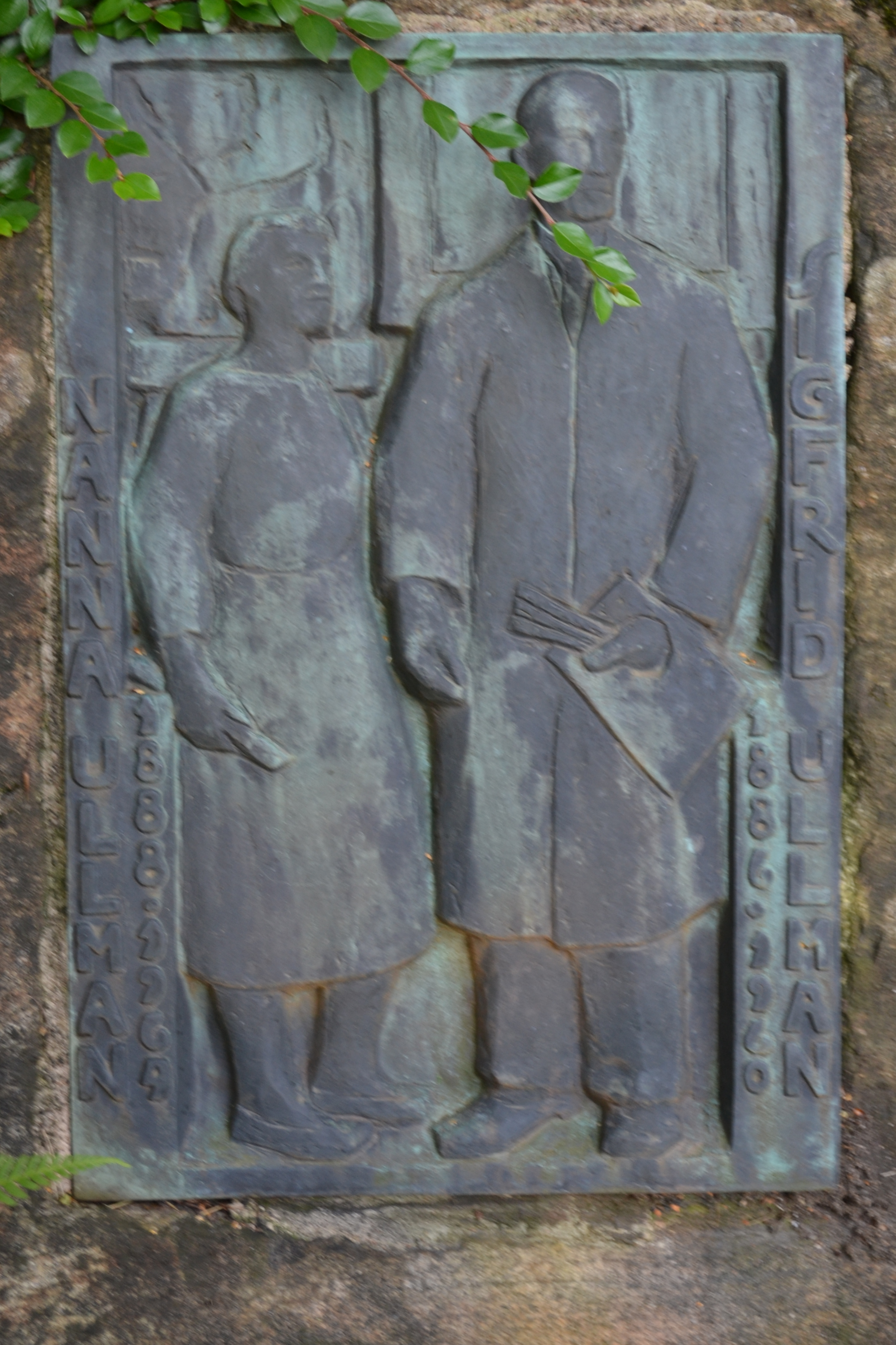 Sankt Jörgens kyrkogård, Varberg.